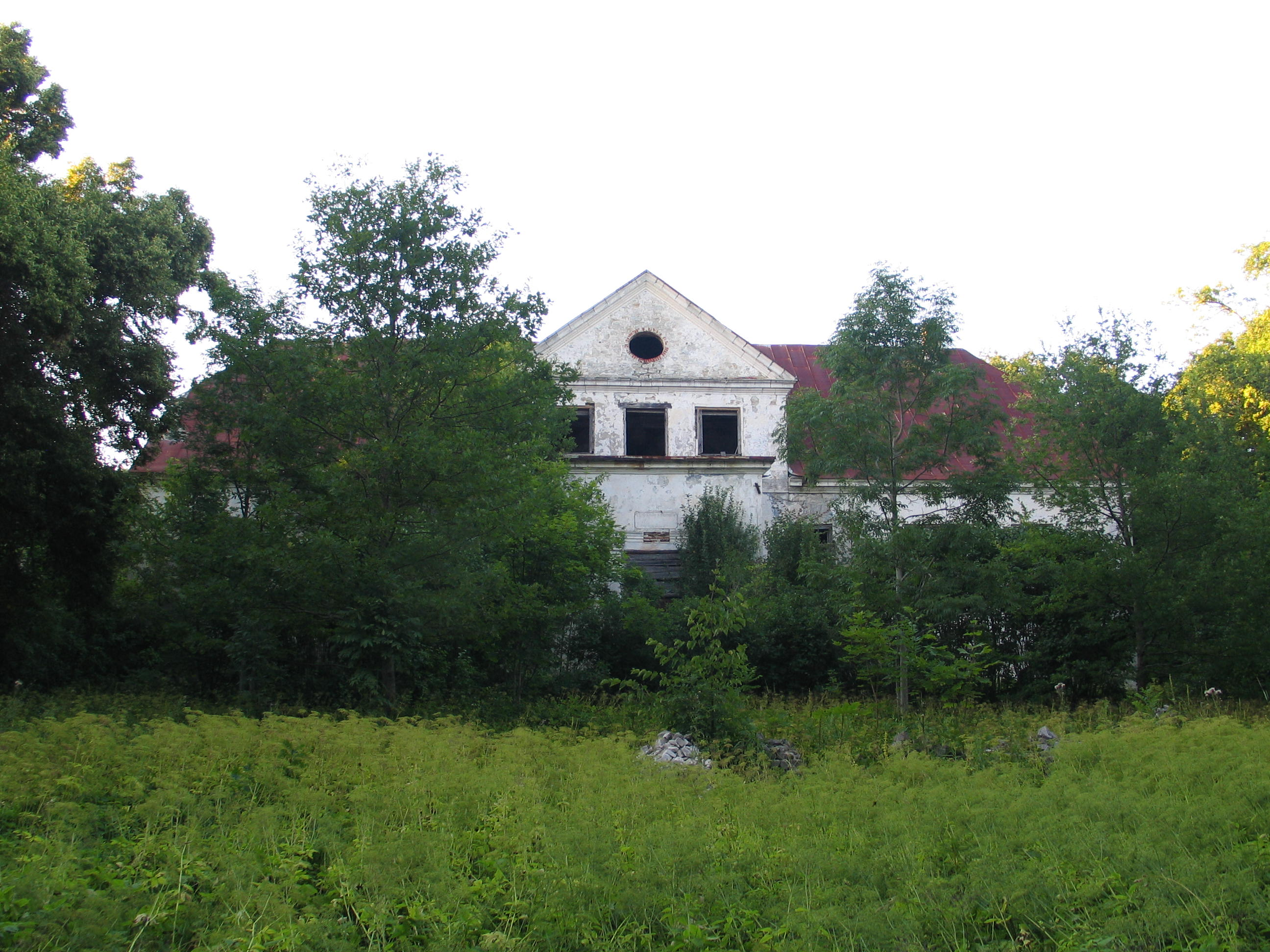 Audla mõisa peahoone